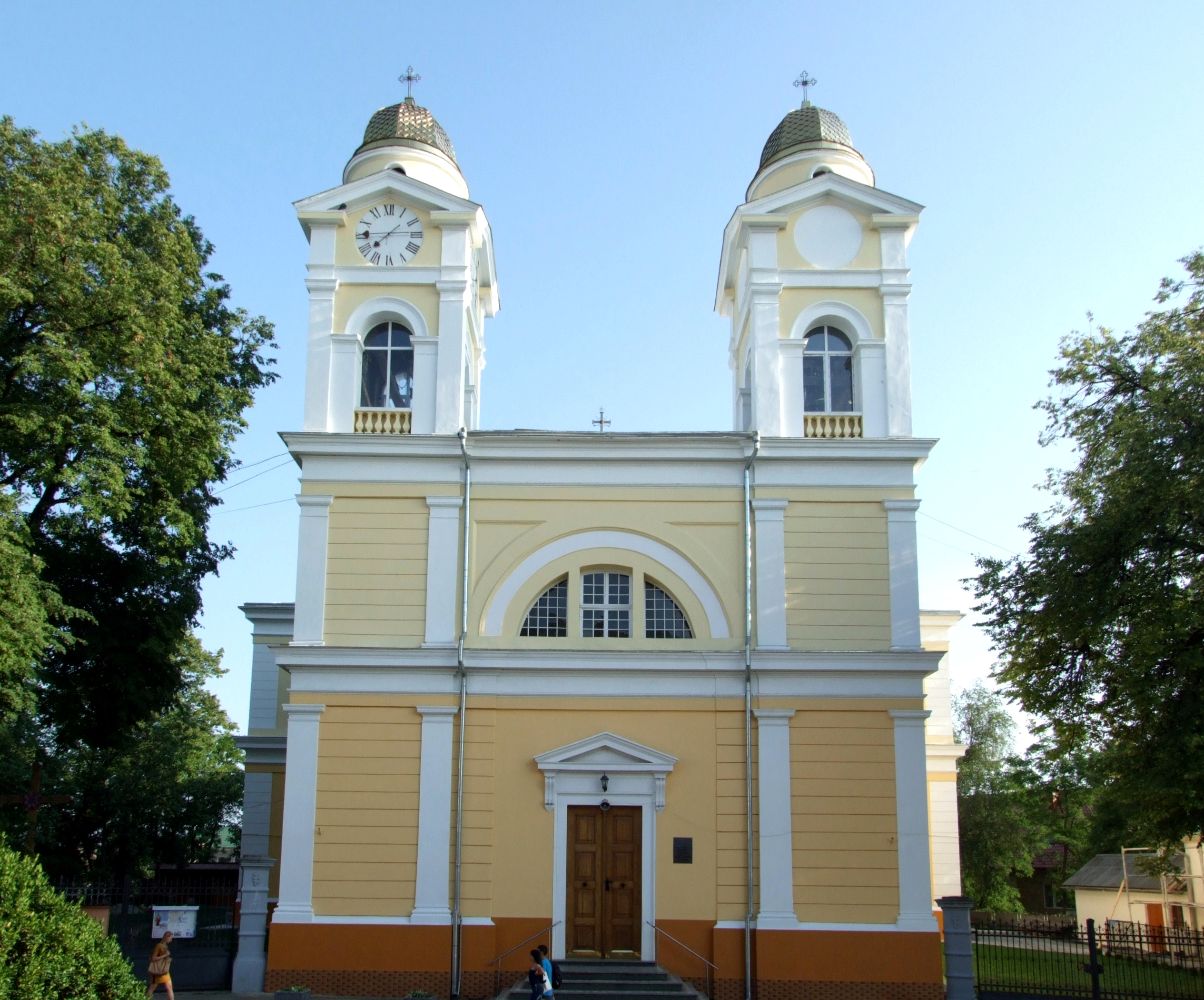 Церква св. Архистратига Михаїла, 1855-1871 рр.